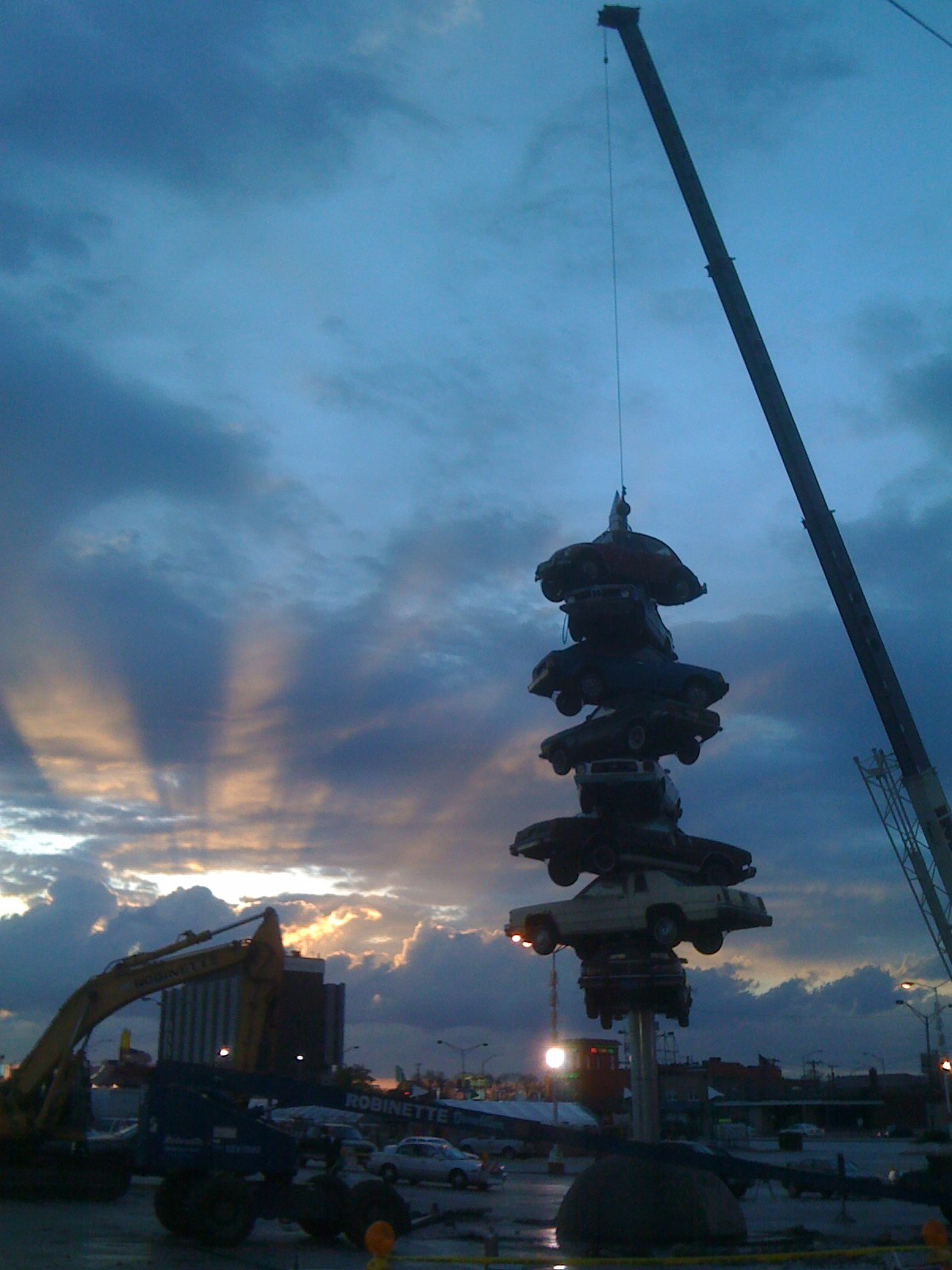 The Spindle in Cermak Plaza in Berwyn, IL being disassembled.